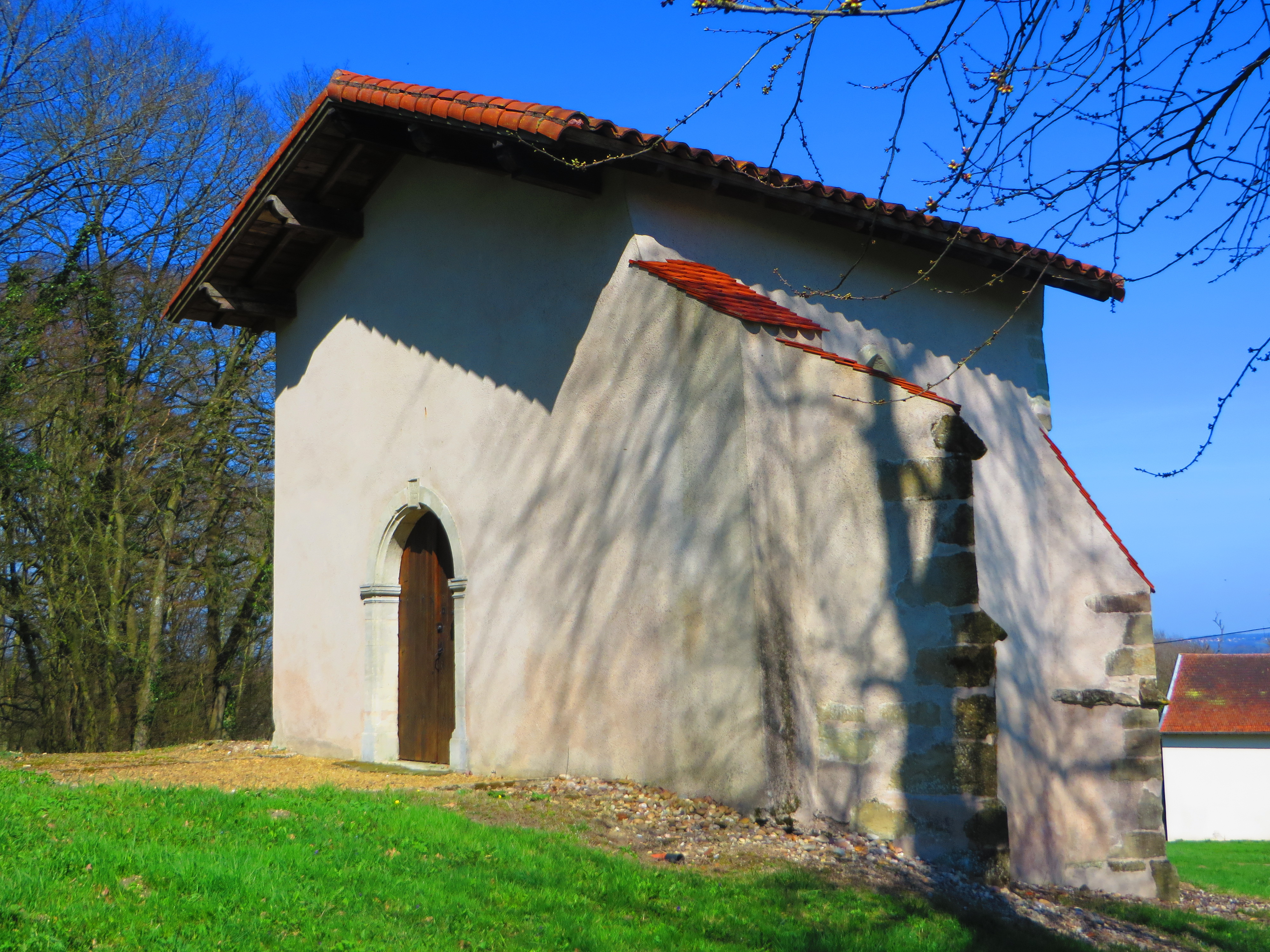 Harprich Bening Chapelle de la Bienheureuse-Vierge-Marie